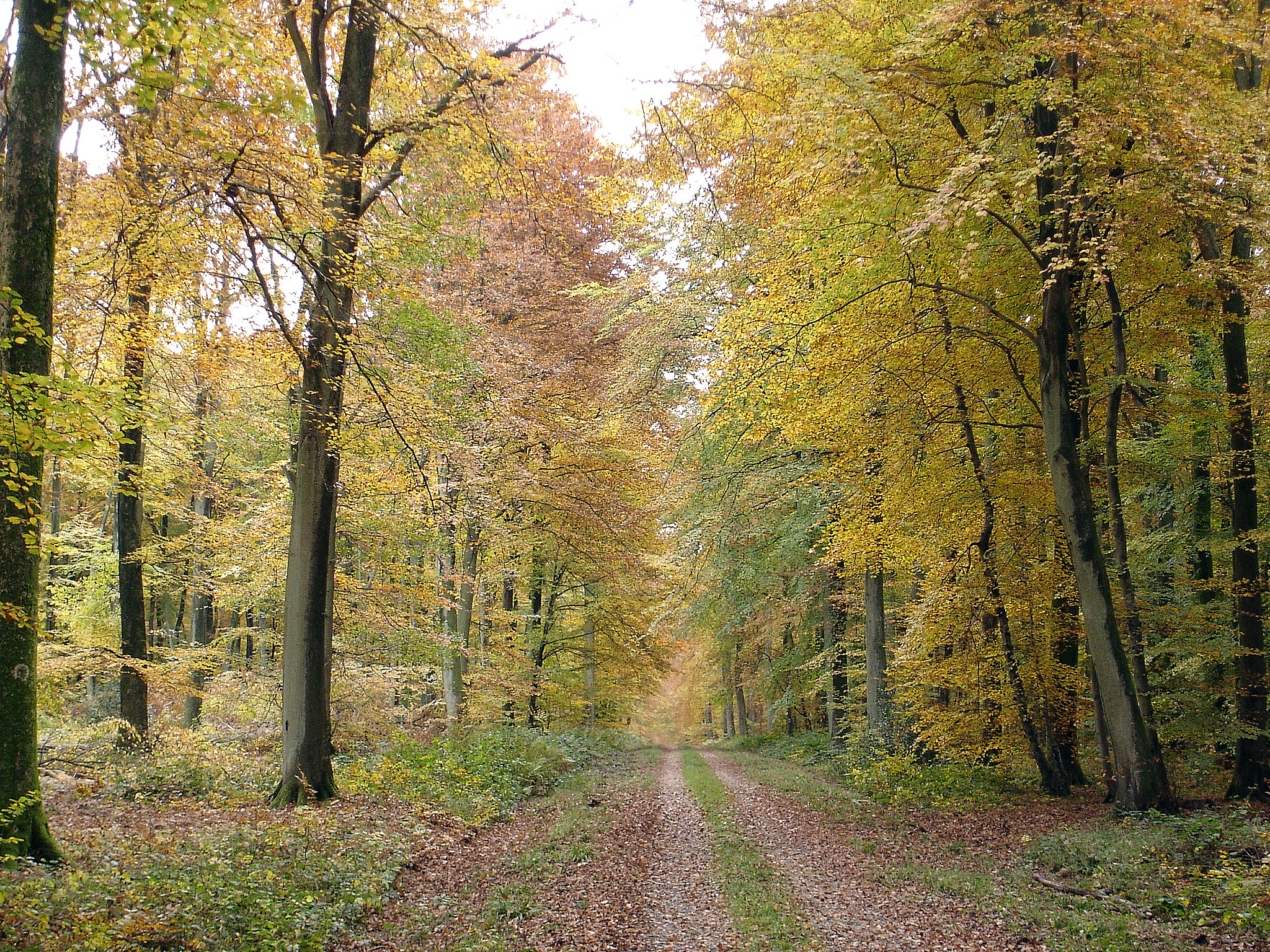 Haute Forêt d'Eu, route de Soreng